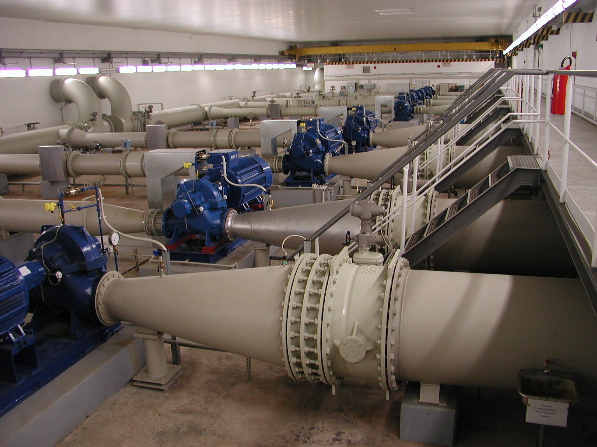 Berlin, Lichtenberg, Landsberger Allee, Wasser-Zwischenpumpwerk: Blick in den modernen Maschinenraum